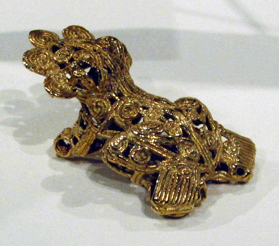 Pre-Columbian jewellery in the Metropolitan Museum of Art